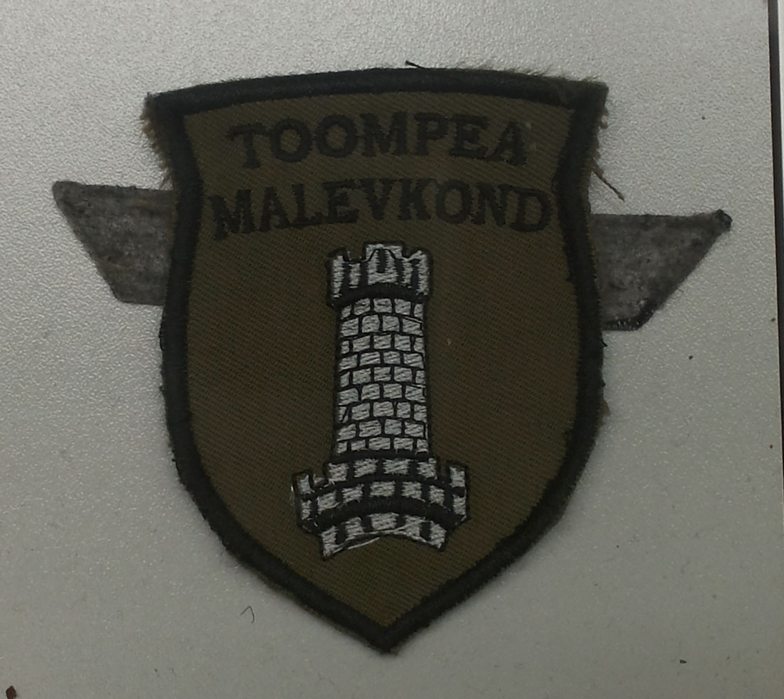 Kaitseliidu Tallinna maleva Toompea malevkonna varrukaembleem